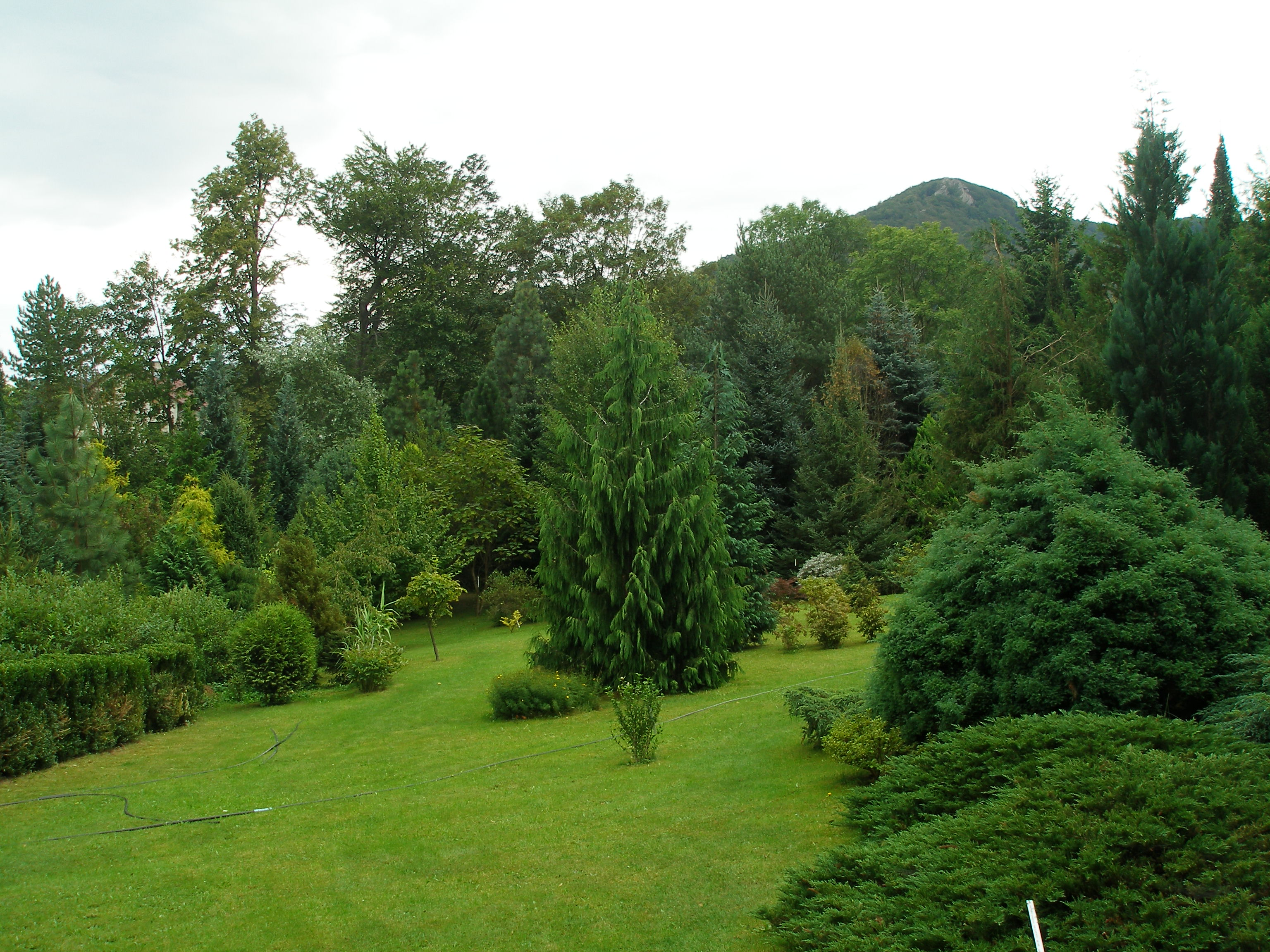 Pohled do Arboreta Josefa Eberta ve Ferdinandově, části Hejnic.